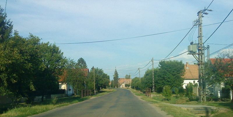 Diósviszló, Petőfi utca